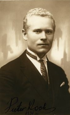 Peeter Kohandi, eesti vaimulik